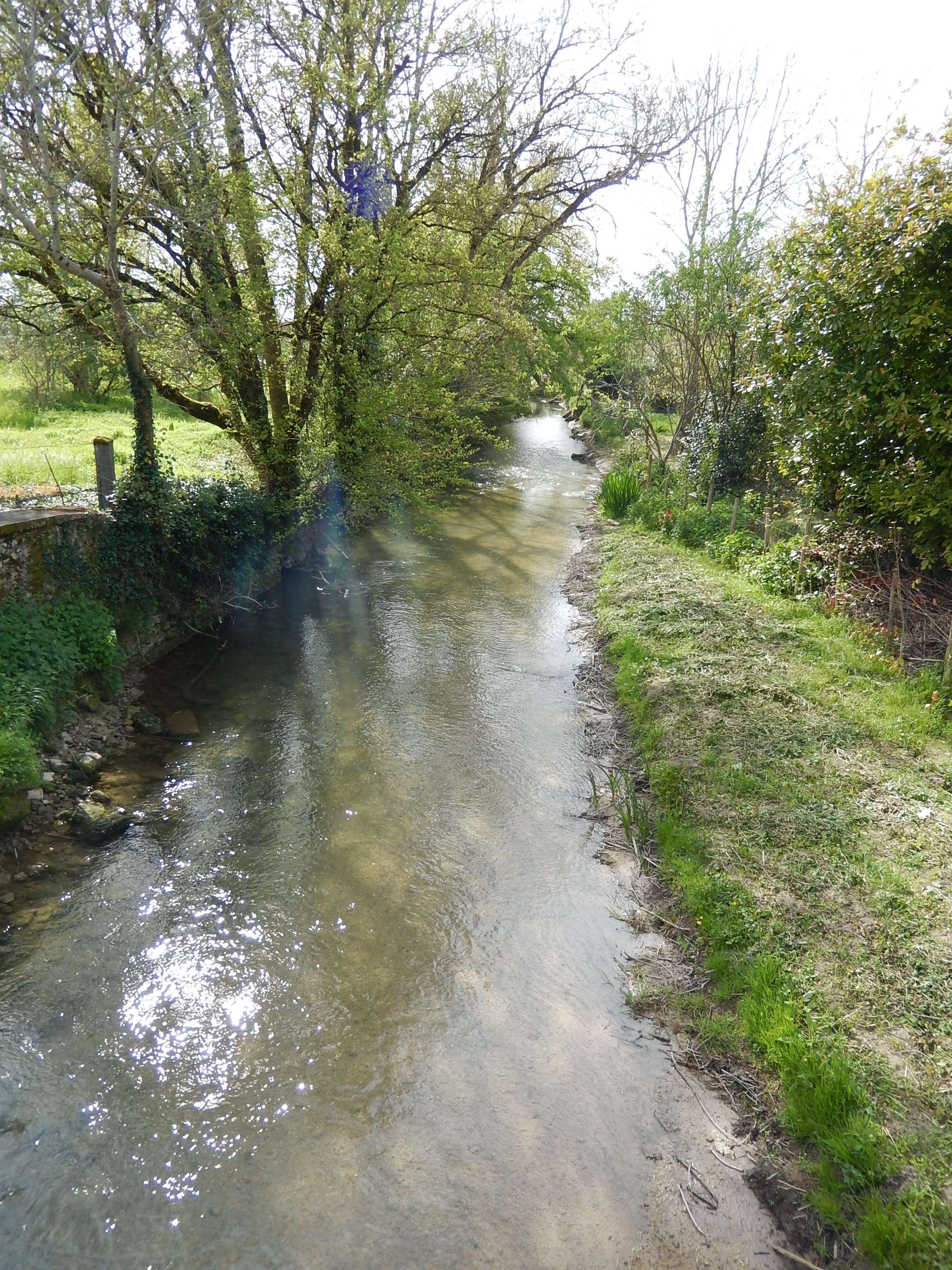 La rivière Trézence à Tournay (commune de Puyrolland).